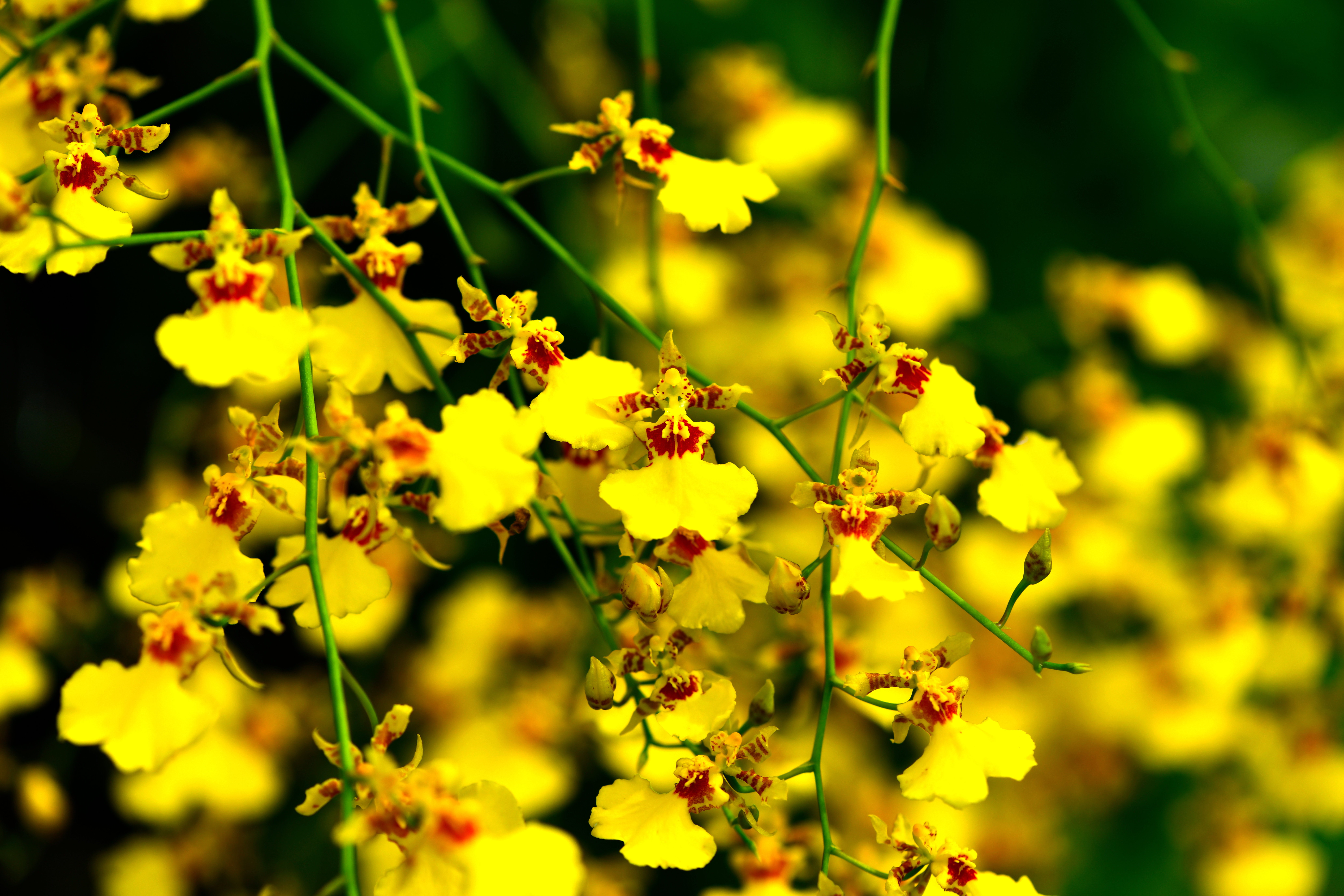 Si Phang-Nga National Park